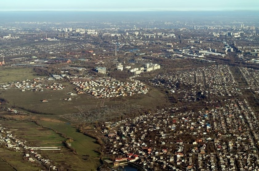 Вид с возуха